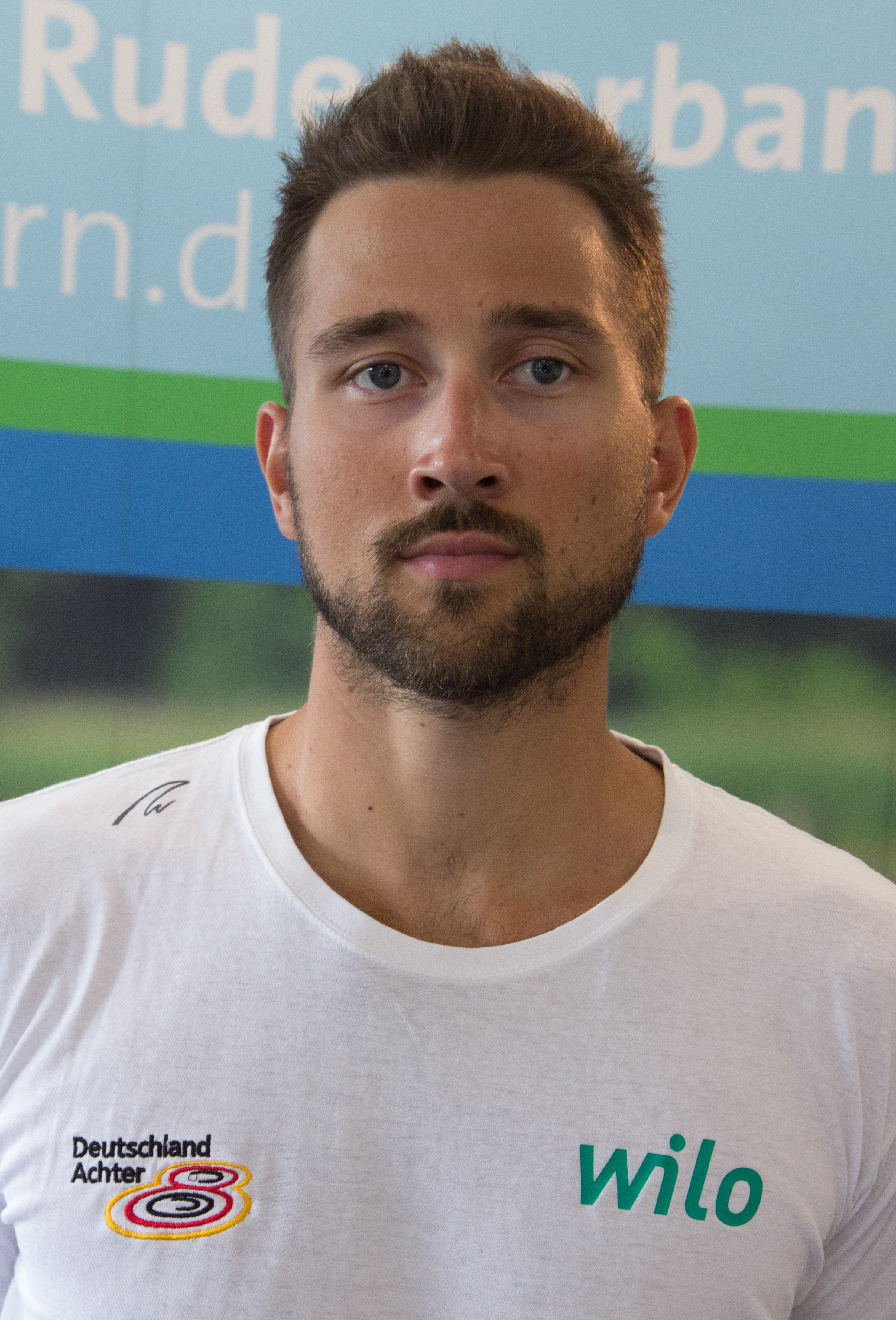 Medientag des Ruderverbandes in der Ruderakademie Ratzeburg am 6. September 2017: Felix Wimberger